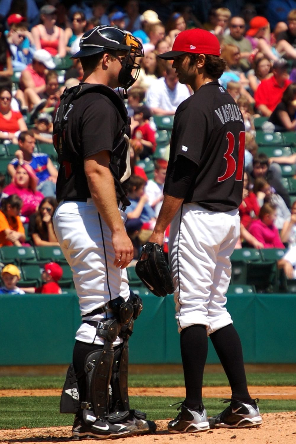 Erik Kratz (left) and Virgil Vasquez